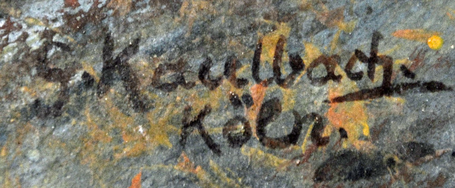 Signatur des Malers Georg Kaulbach